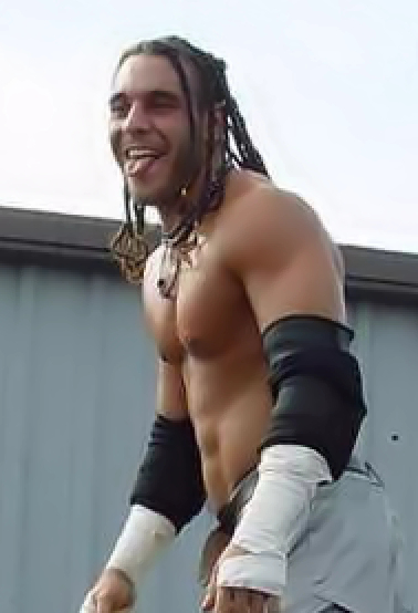 Photo de Trent Acid.